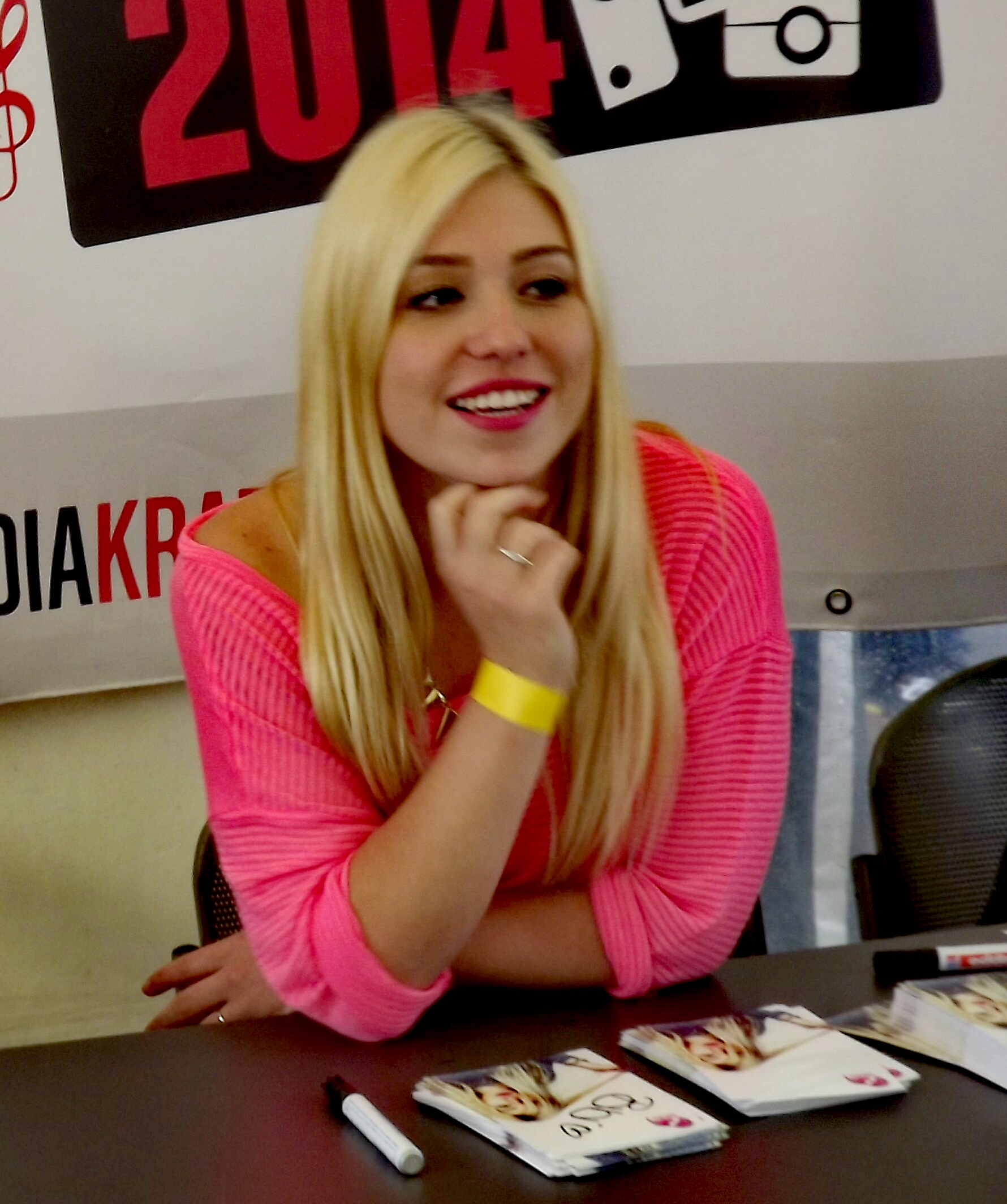 YouTube-Star Bianca Heinicke